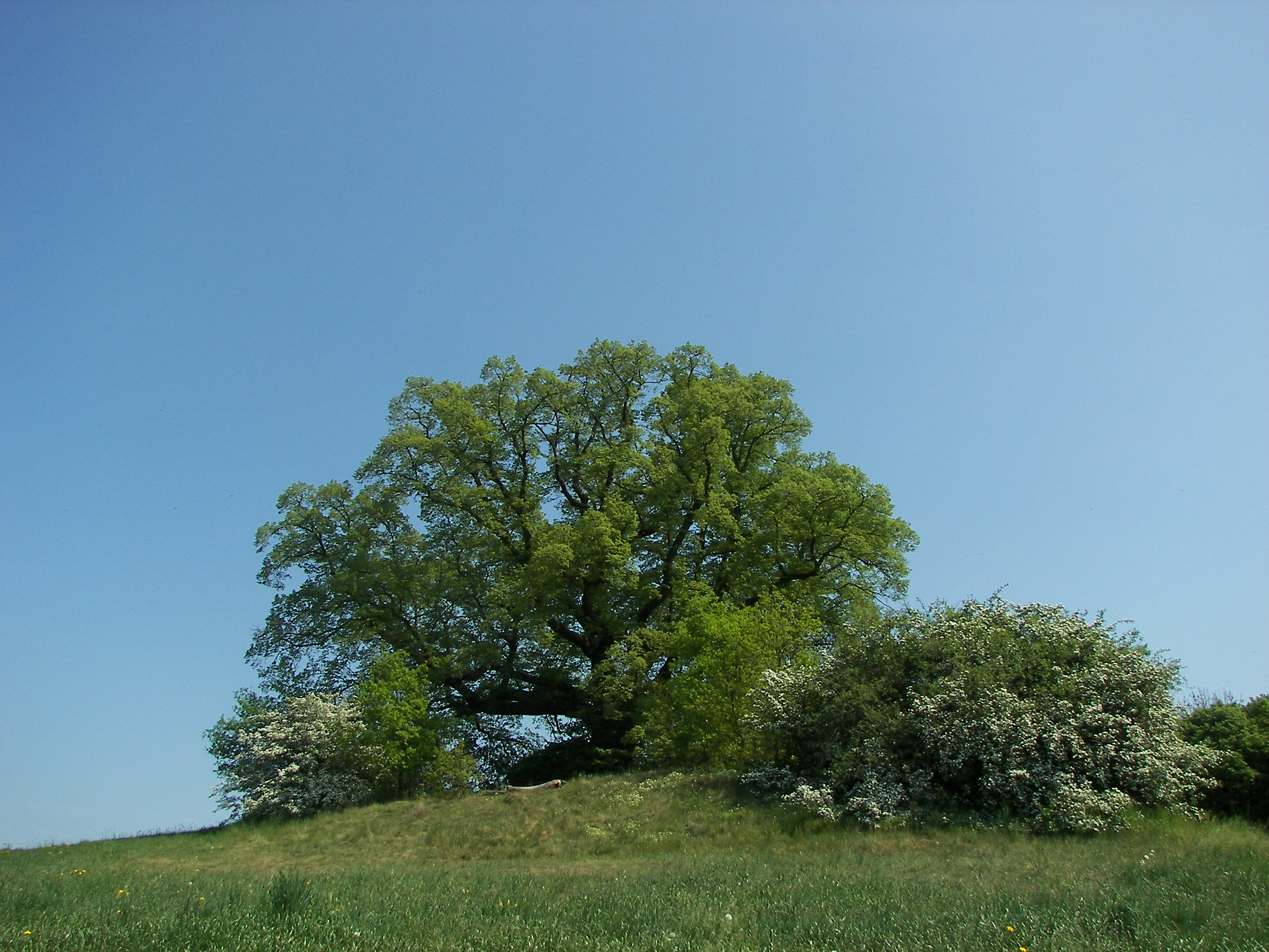 Sommerlinde (Tilia platyphyllos), „Gerichtslinde“ in Wetter-Amönau, Hessen, Deutschland